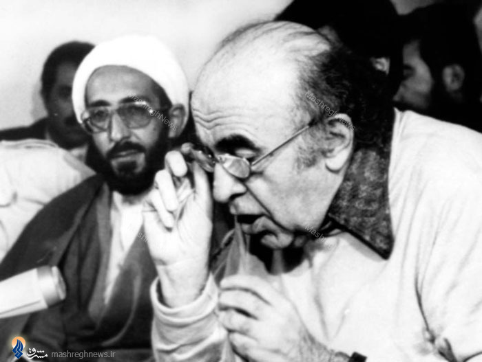 امیرعباس هویدا در دادگاه